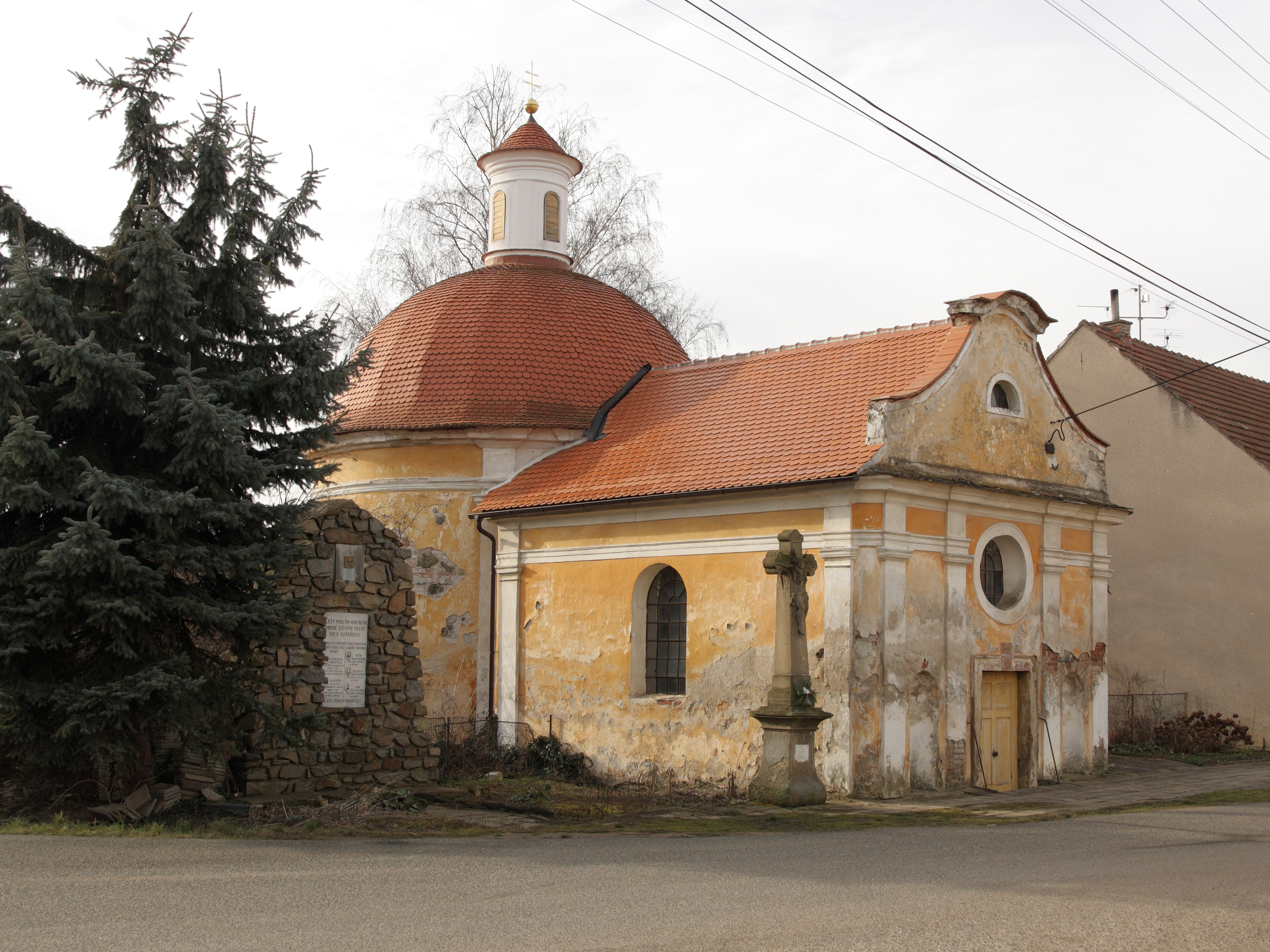 Kupařovice - kaple Neposkvrněného početí Panny Marie.